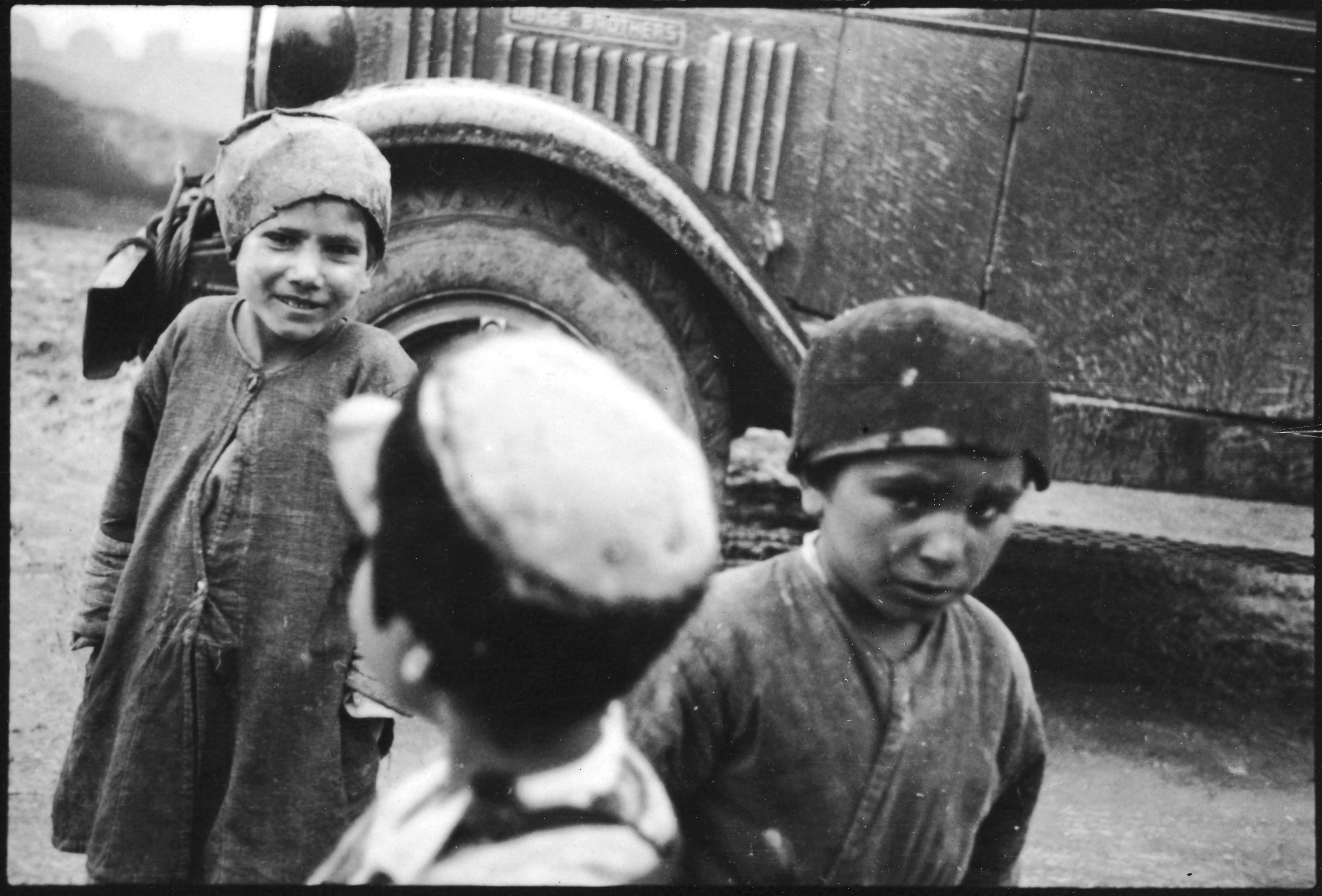 Persien, Persepolis: Kinder; Kinder vor einem Automobil, auf der Fahrt nach Persepolis